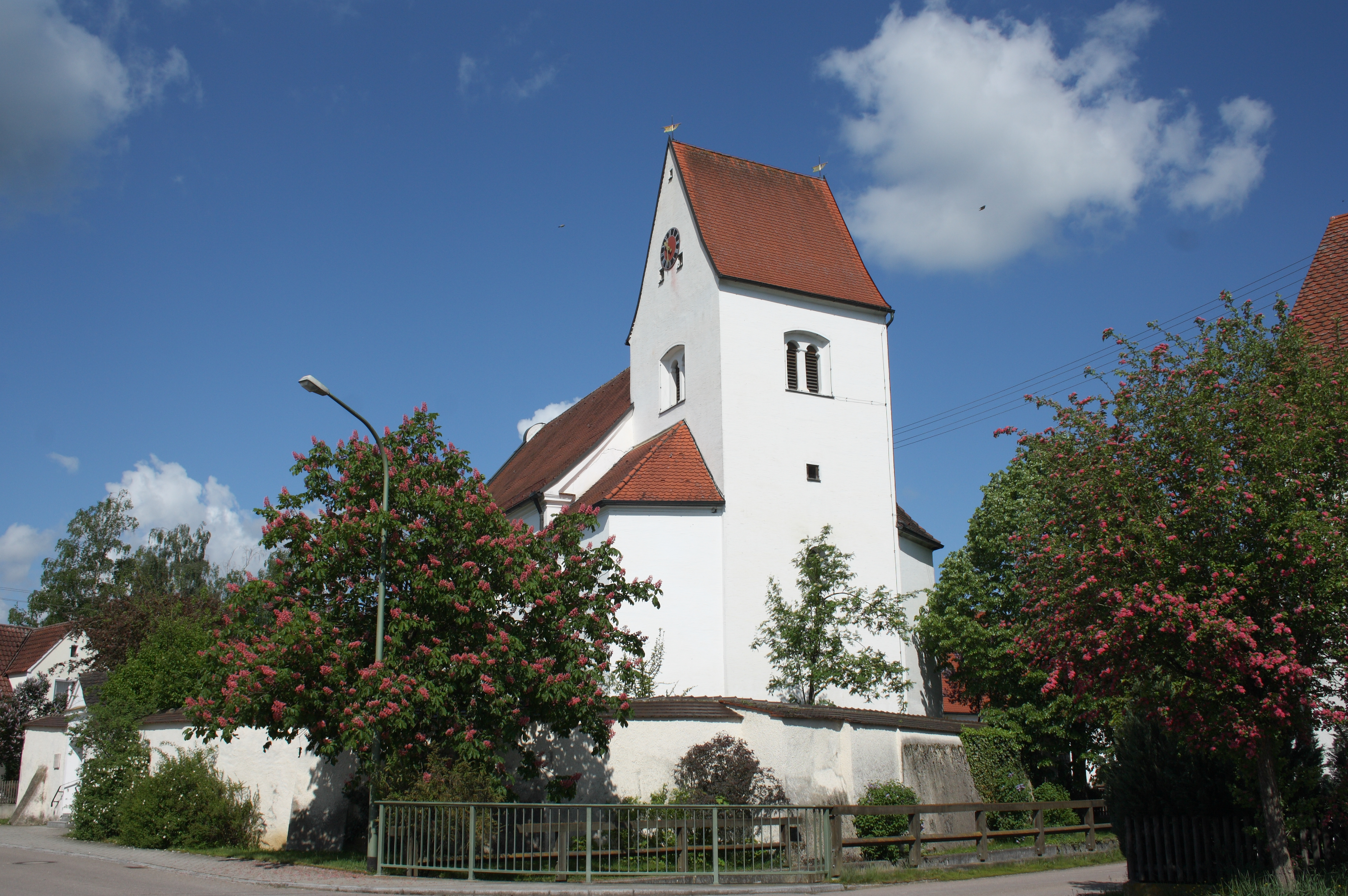 Katholische Pfarrkirche Maria Immaculata in Schwennenbach, einem Stadtteil von Höchstädt an der Donau im Landkreis Dillingen an der Donau (Bayern), von 1758, Turm aus dem 14. Jahrhundert